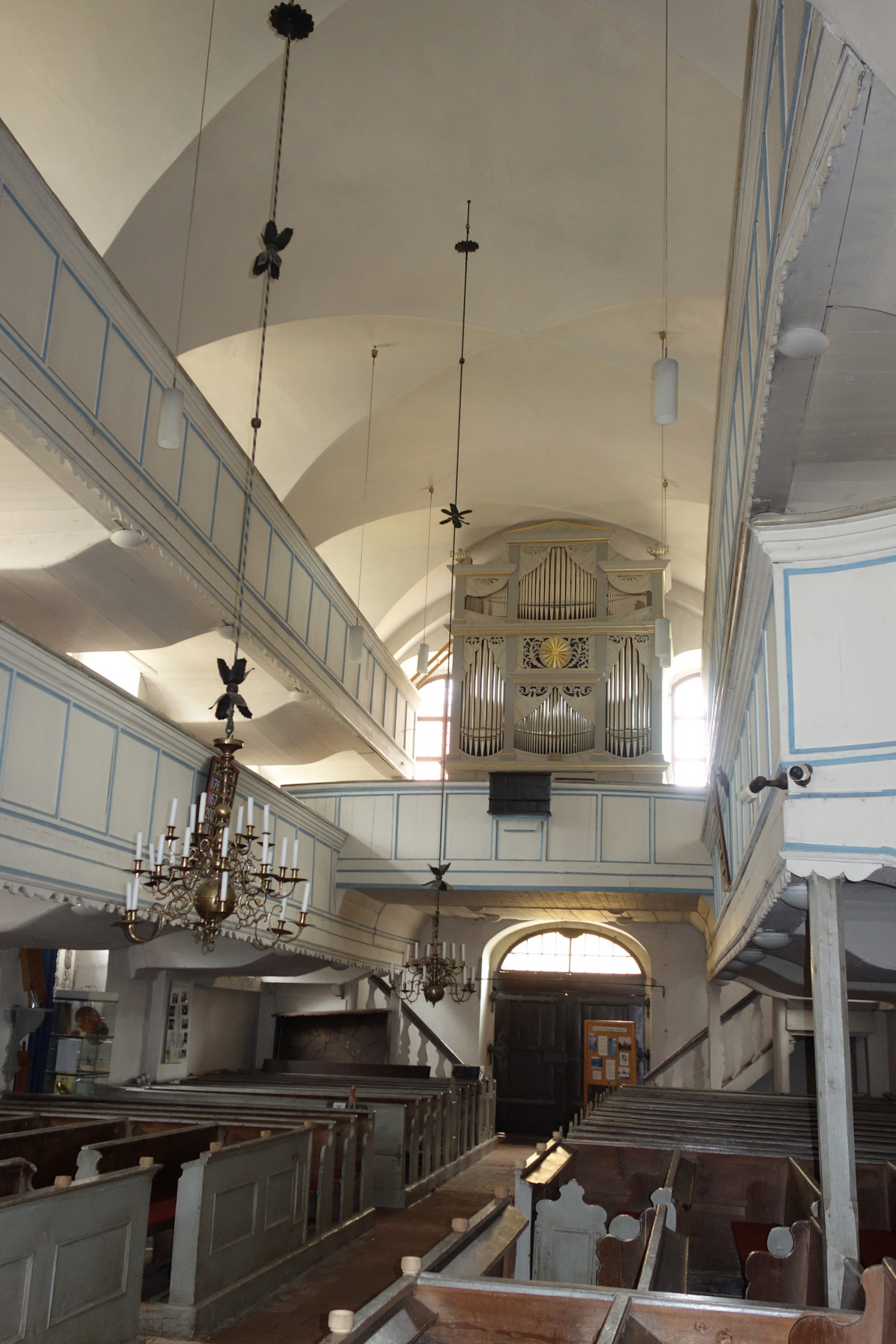 Orgel der Wehrkirche Horka, Sachsen, Deutschland